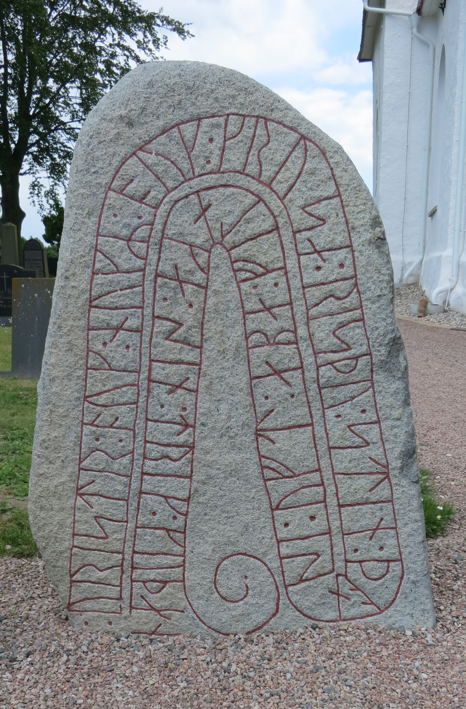 DR 339 Stora Köpingestenen